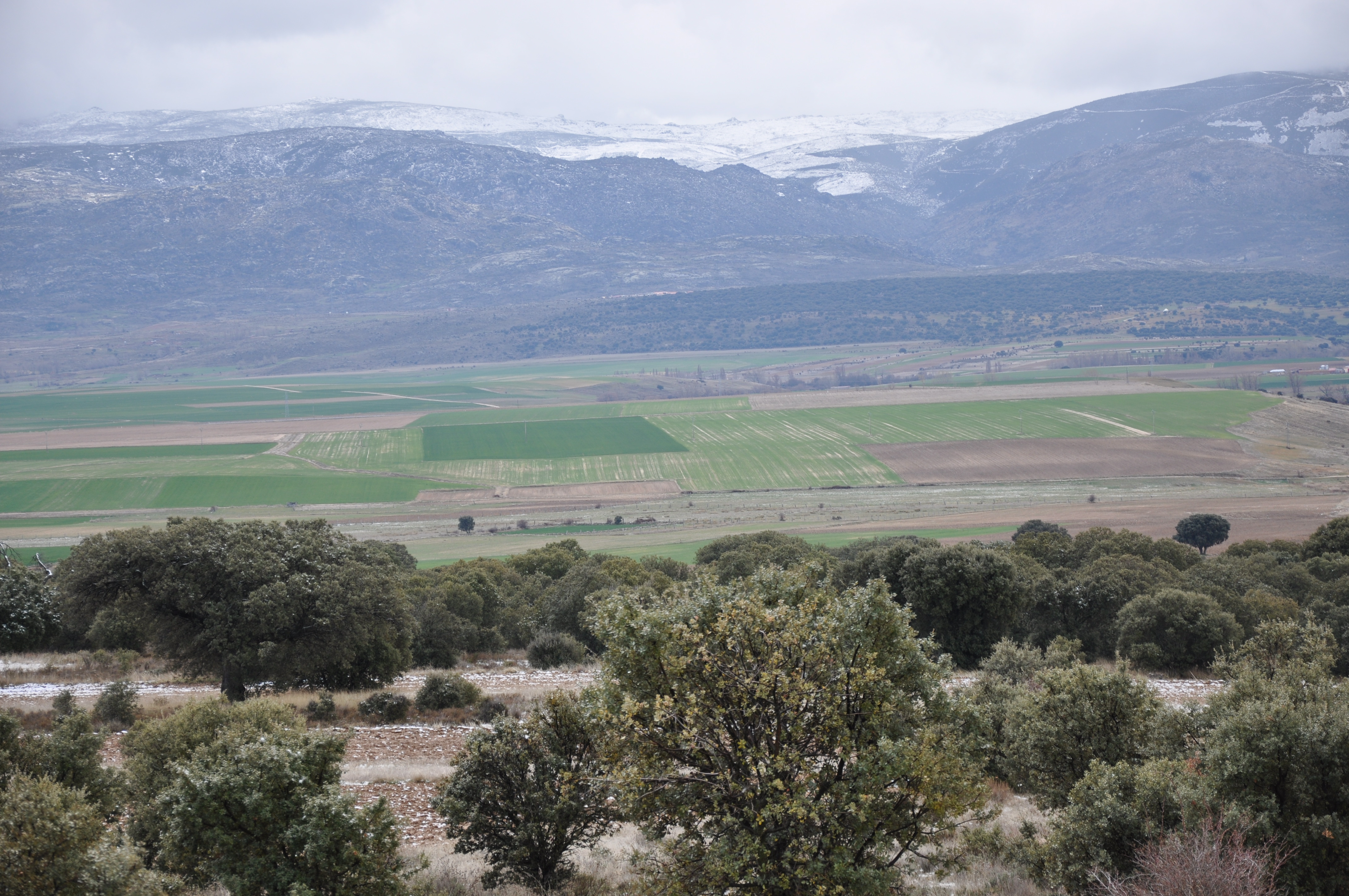 Valle de Ambles, Ávila, España.